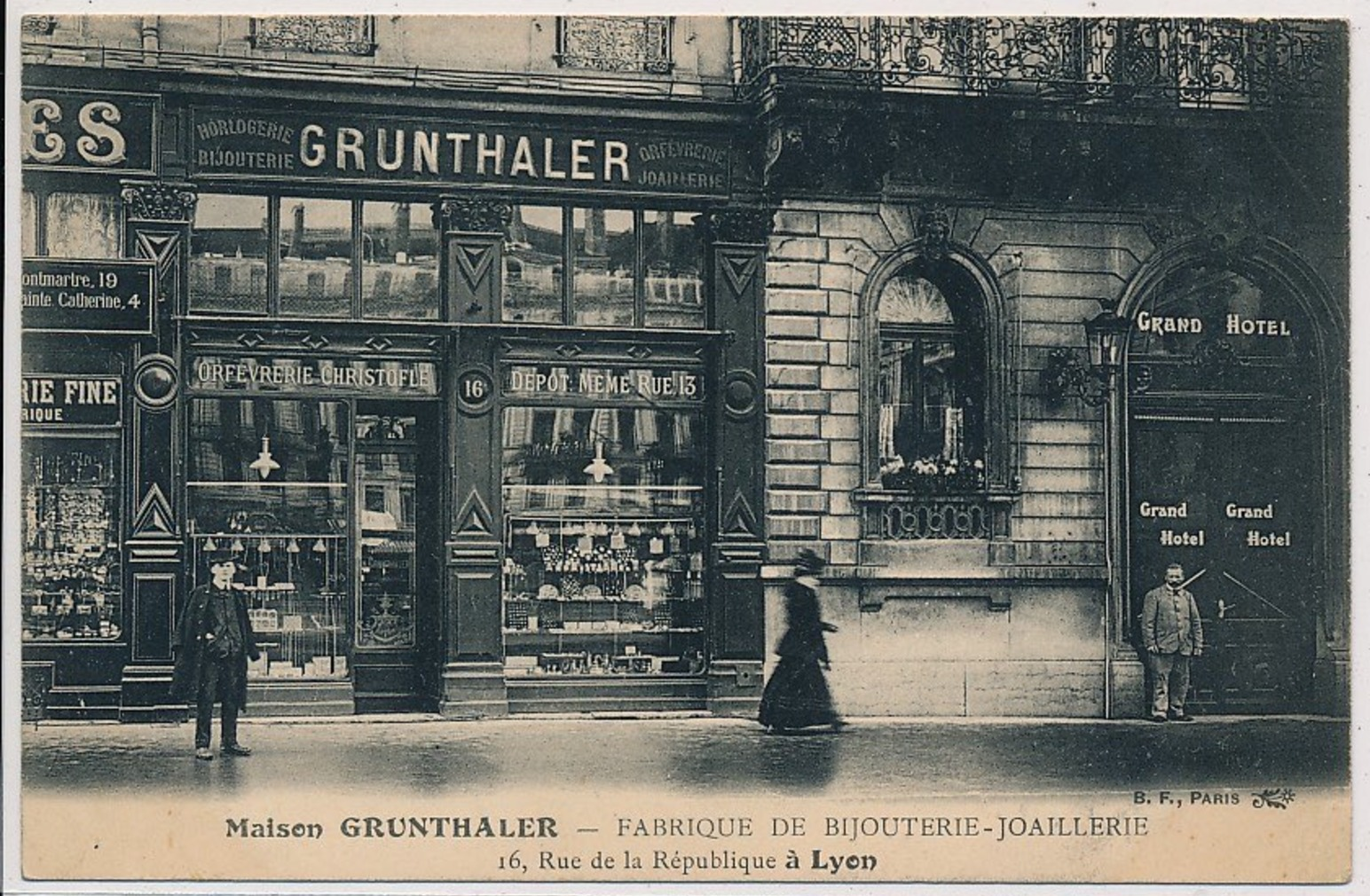 Catalogues anciens des grands magasins du Globe